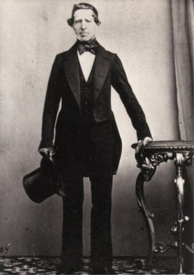 L'immagine proviene dal mio archivio familiare